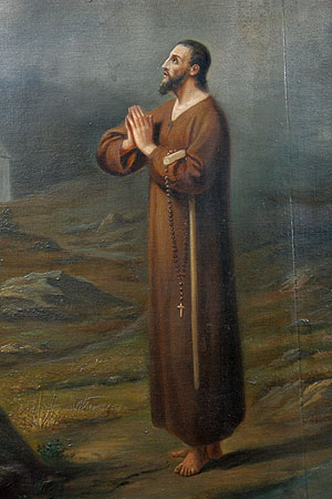 Ausschnitt aus einem Bild des Bruder-Klausen-Zyklus von Louis Niederberger aus dem 19. Jahrhundert in der Grabkapelle Sachseln.